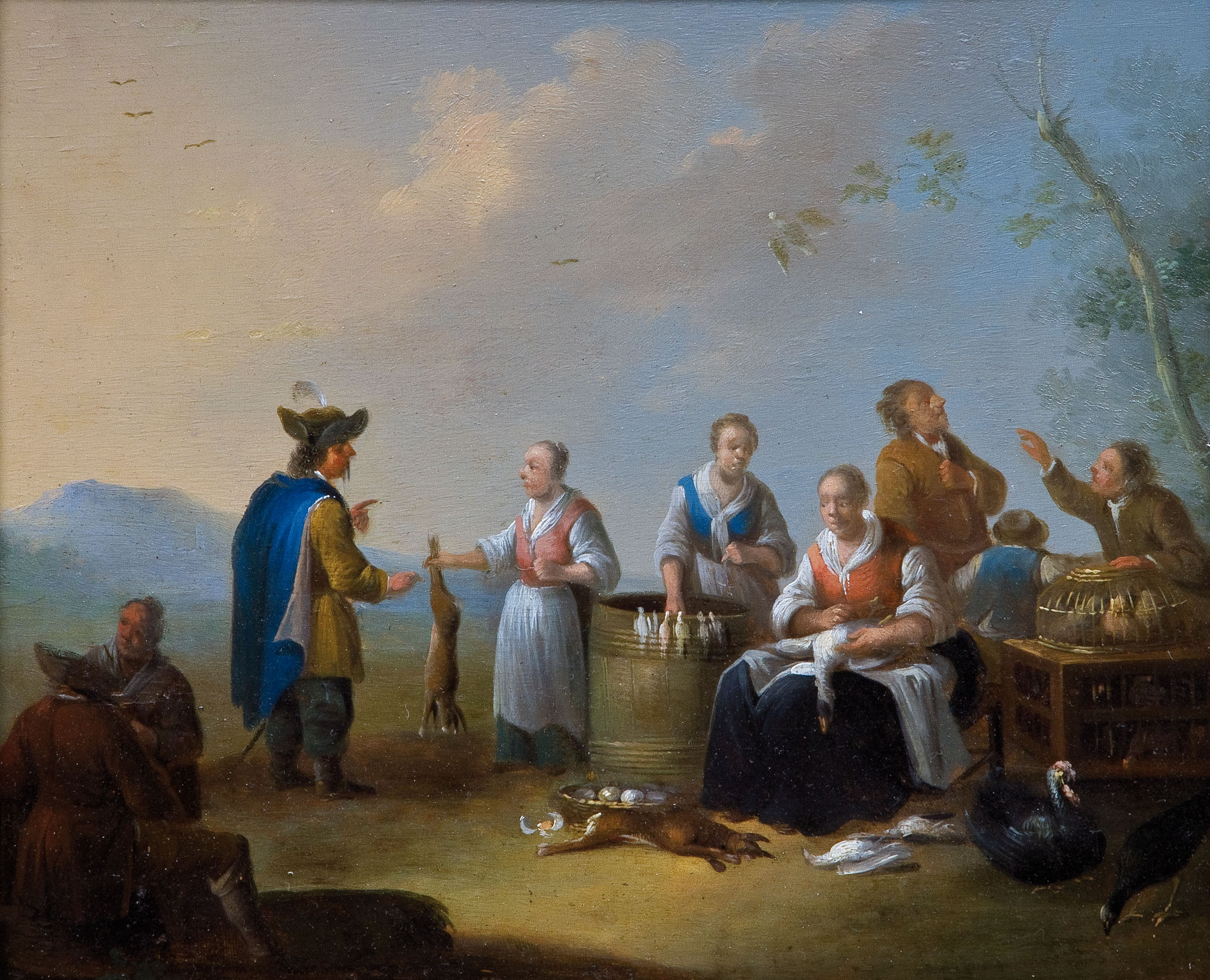 „Auf dem Vogelmarkt“ (Frauen bieten Hasen und Wildvögel an). Öl auf Holz, 30 x 25 cm